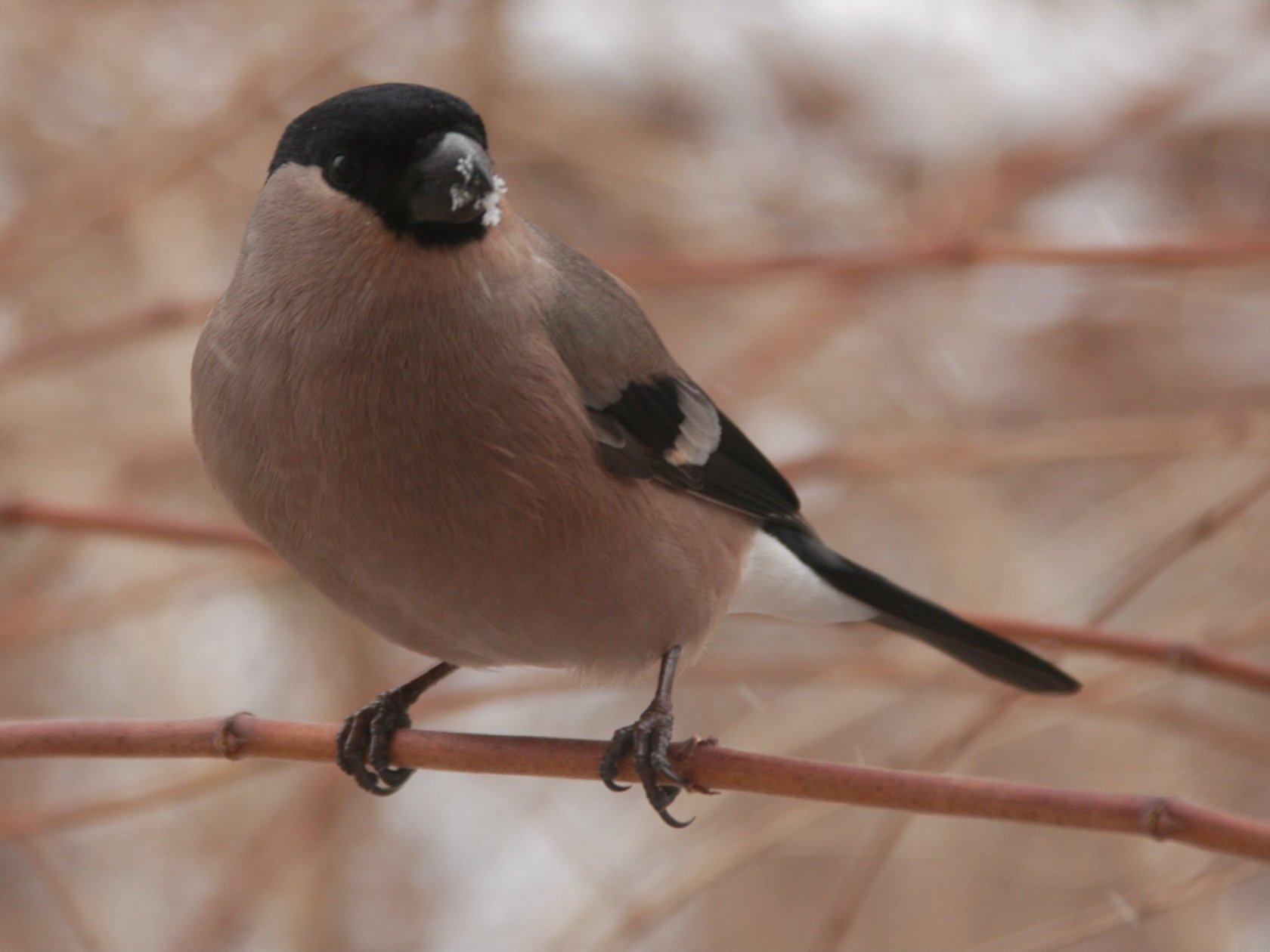 Gimpel (Pyrrhula pyrrhula) auf Zweig